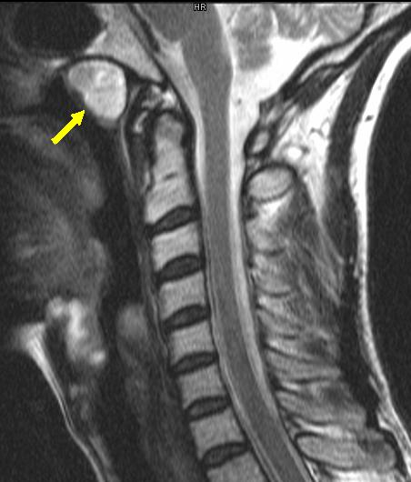 Tornwaldt-Zyste im Rachendach. Sagittale T2-gewichtete Kernspintomographie